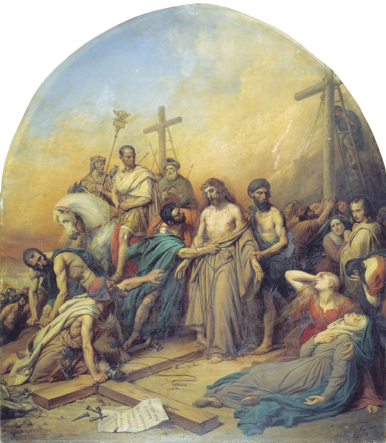 На Голгофе. Изображён Иисус, подводимый палачами к распятию.